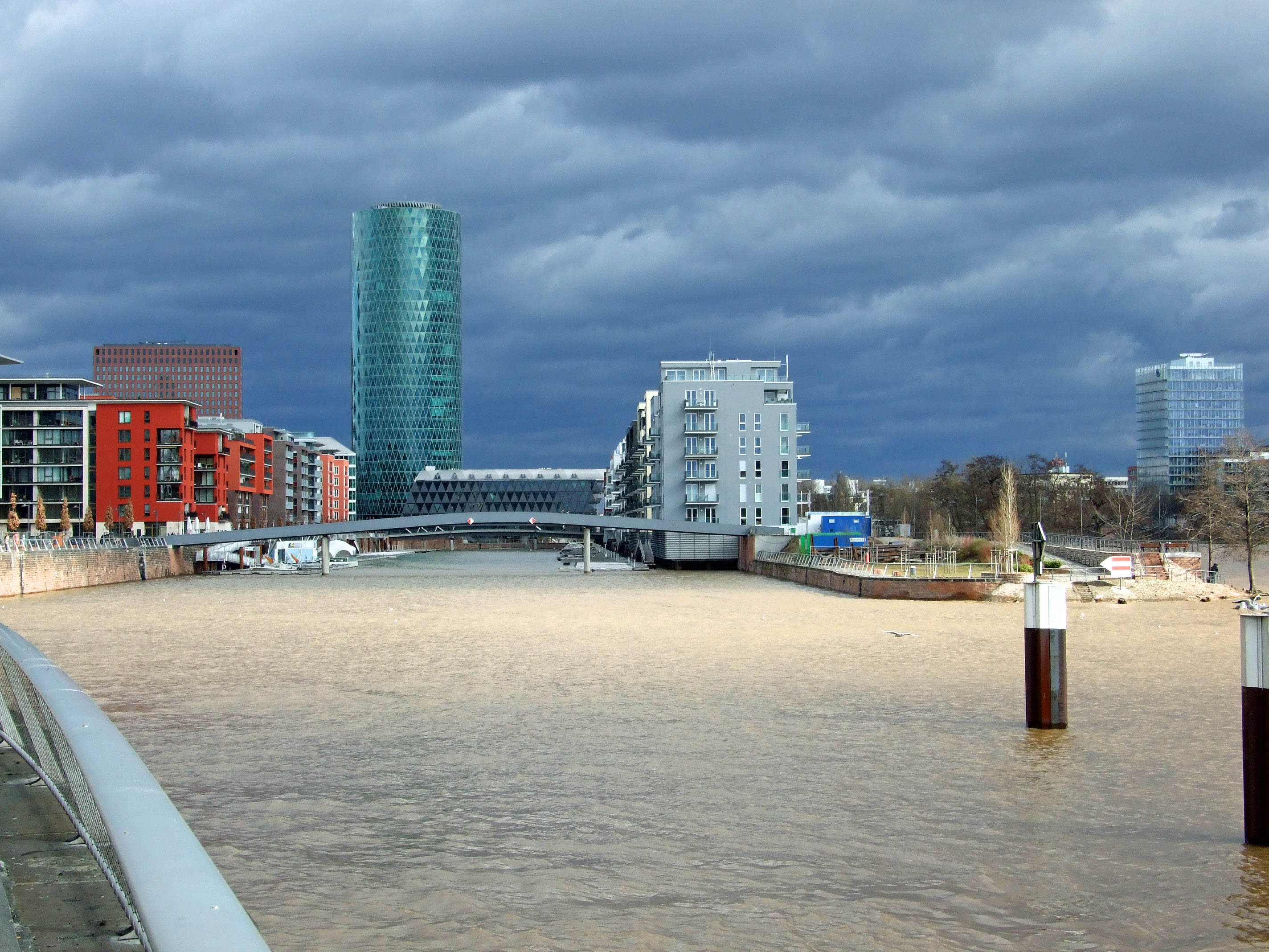 „Westhafenbecken“ am gelben Fluss „Main“ in Frankfurt, Blickrichtung Osten - gegen die Flussrichtung nach Gewittern am Oberlauf